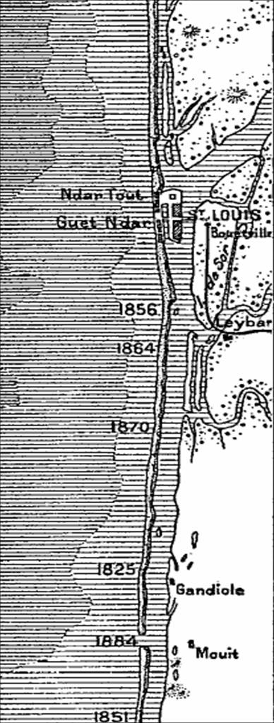 Carte des environs de Saint-Louis du Sénégal, in Elisée Reclus, Nouvelle géographie universelle : la terre et les hommes, tome XII, p. 191